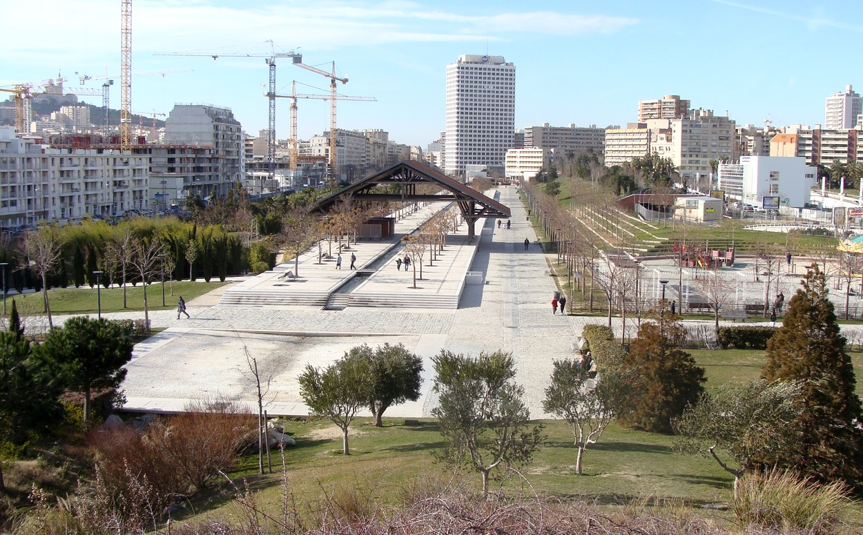 L'emplacement de l'ancienne gare du Prado, aujourd'hui parc du 26e centenaire de Marseille (vue depuis le sud-est ; la gare était au fond, en butoir).